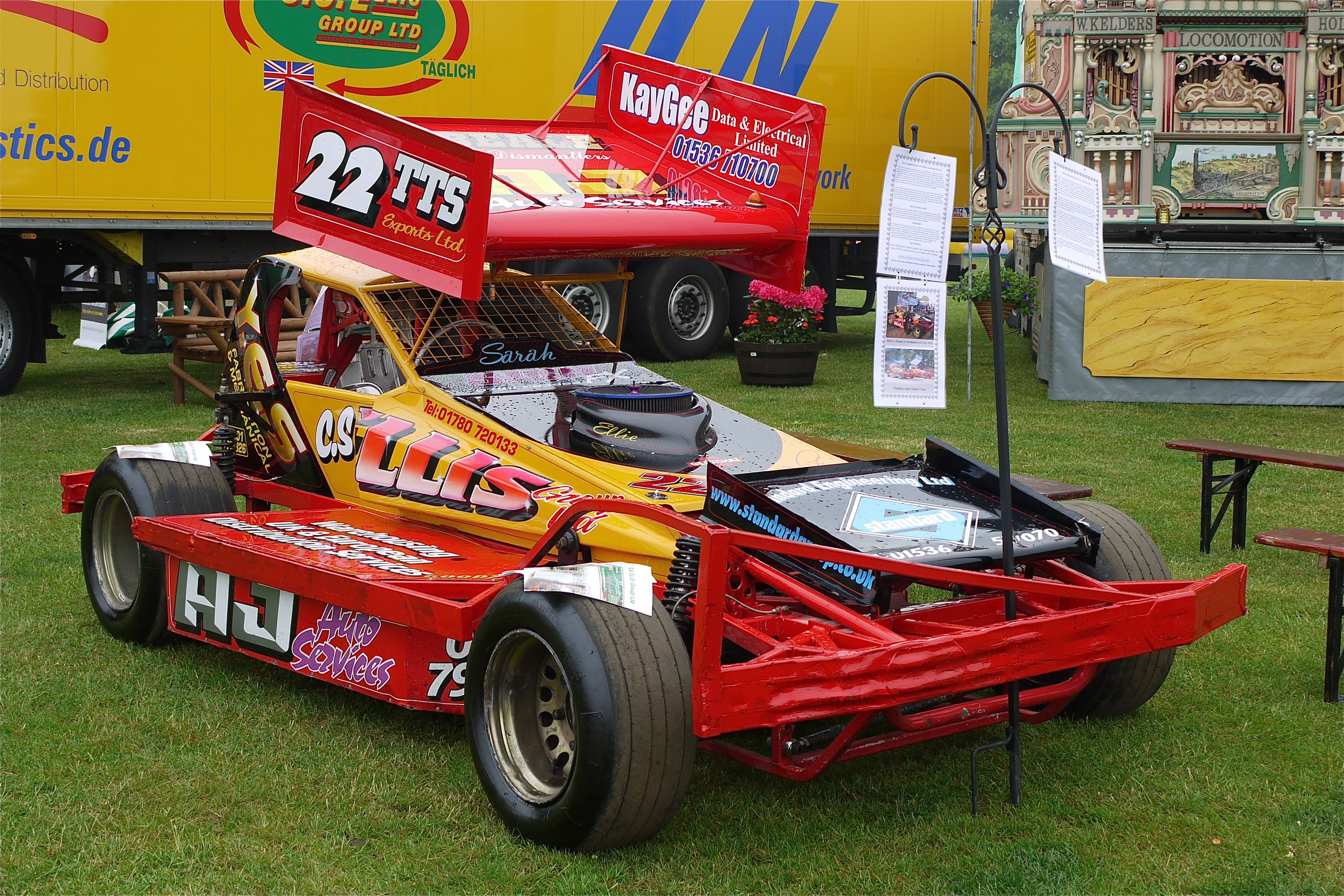 Panasonic G1 14-45 Lens